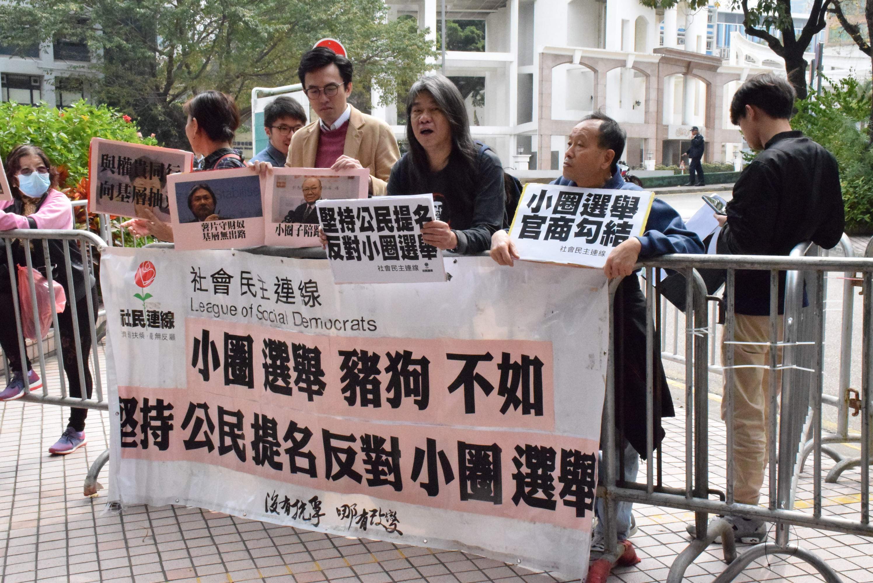 中文（香港）: 多名社民連成員抗議特首小圈子選舉 (美國之音湯惠芸)